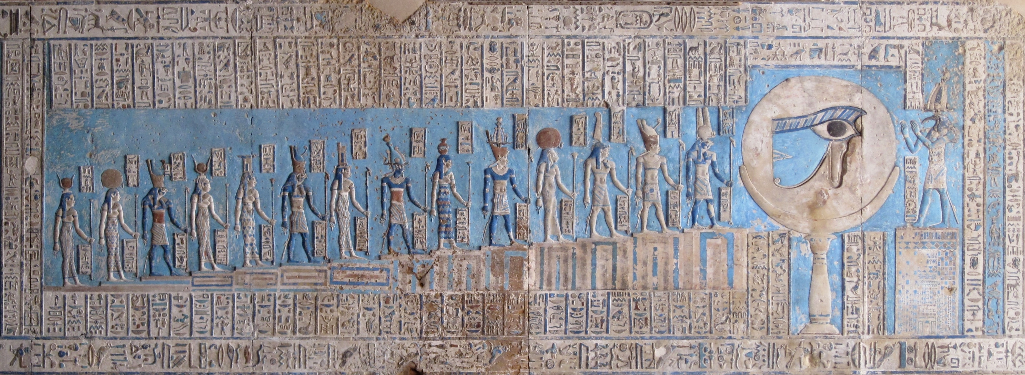 Deckenrelief im Tempel von Dendera, Ägypten